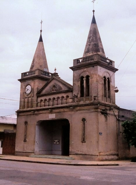 Iglesia de Sarandí del Yi Uruguay